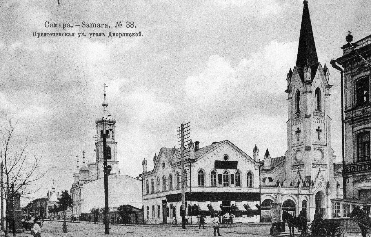 фотографии Самары конца 19-начала 20 века